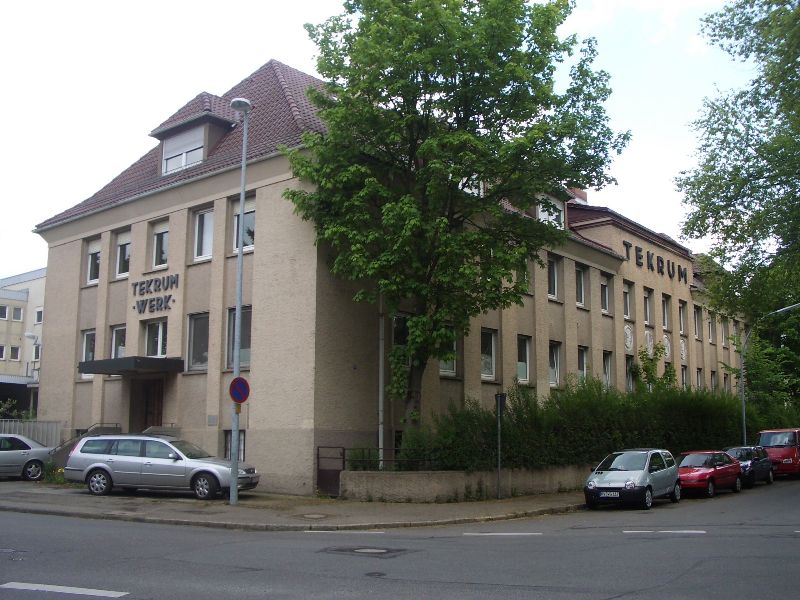 Ehemalige Tekrum-Gebäckfabrik, Ziegelstraße, Ravensburg